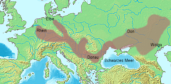 Kurganisierung im Alten Europa (helle Markierung rechts: ursprüngliche Einflussgebiete der Kurgankultur; dunkle Markierung links: durch Kurganelemente veränderte Kulturen)